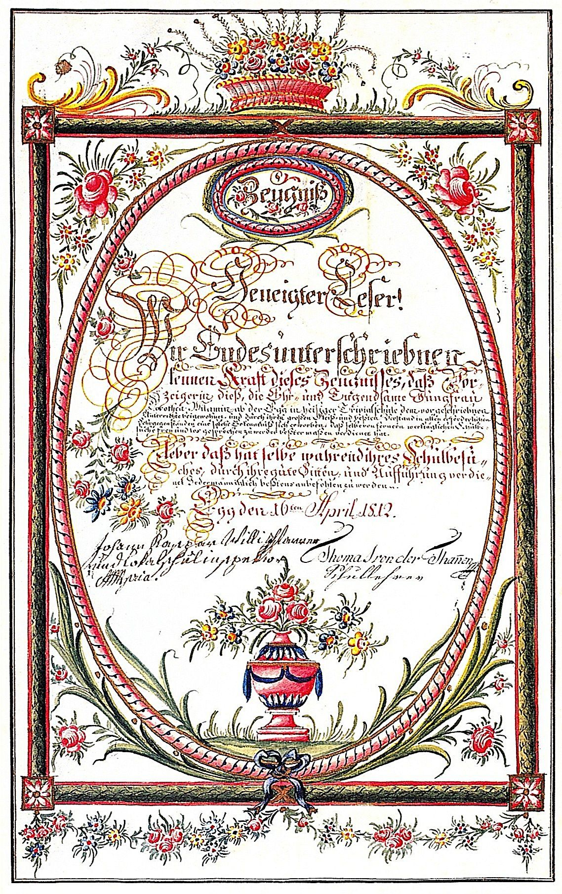 Schulzeugnis der Trivialschule in Egg im Bregenzerwalde, für Dorothea Vilamin am 16. April 1812